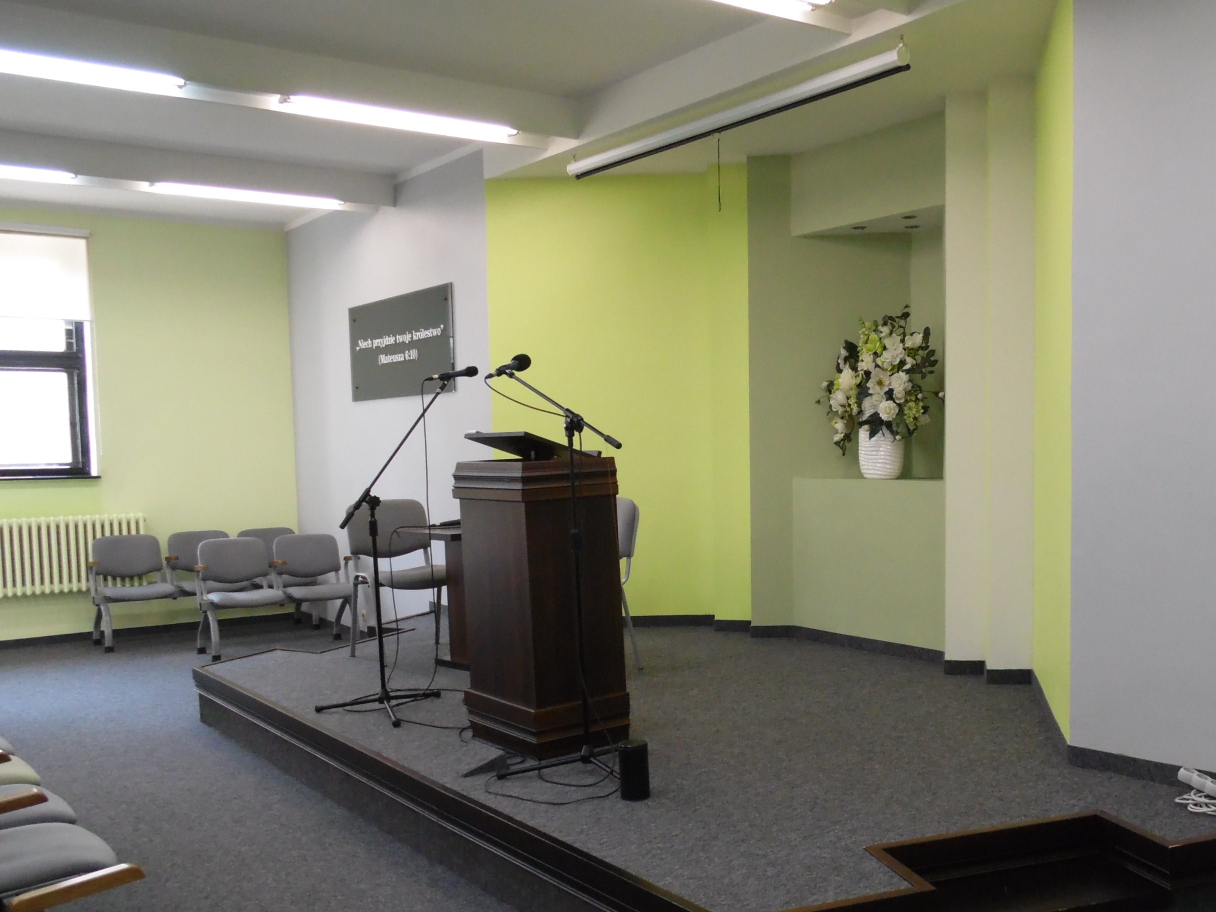 OLSZTYN. SALA KRÓLESTWA ŚWIADKÓW JEHOWY PRZY UL. TRAUGUTTA.